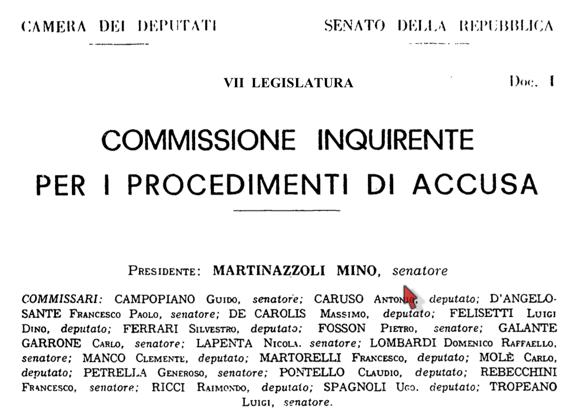 Foto della intestazione della Relazione della Commissione Inquirente sullo Scandalo Lockheed del 1977.